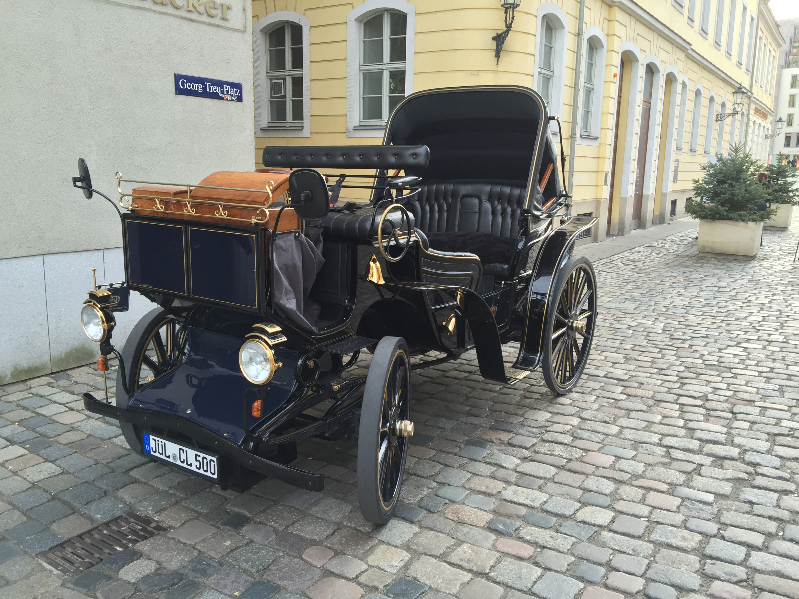 Nachbau eines Motorfahrzeugs der Pionierzeit von Aaglander in Dresden